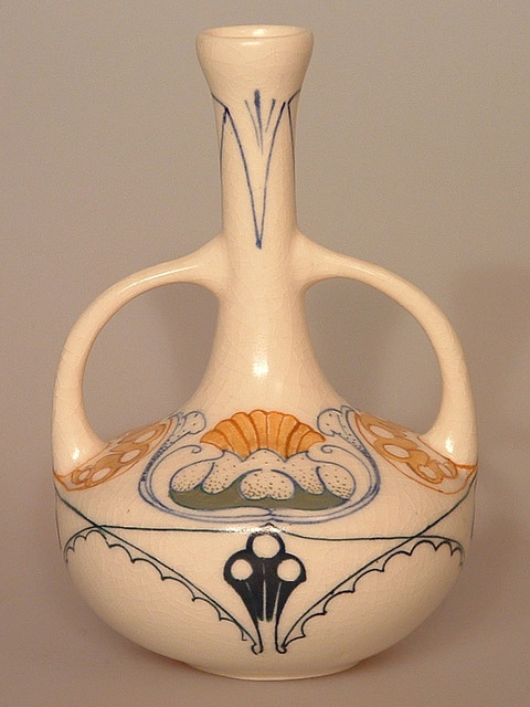 Model 32